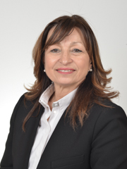 Donatella Tesei - XVIII Legislatura